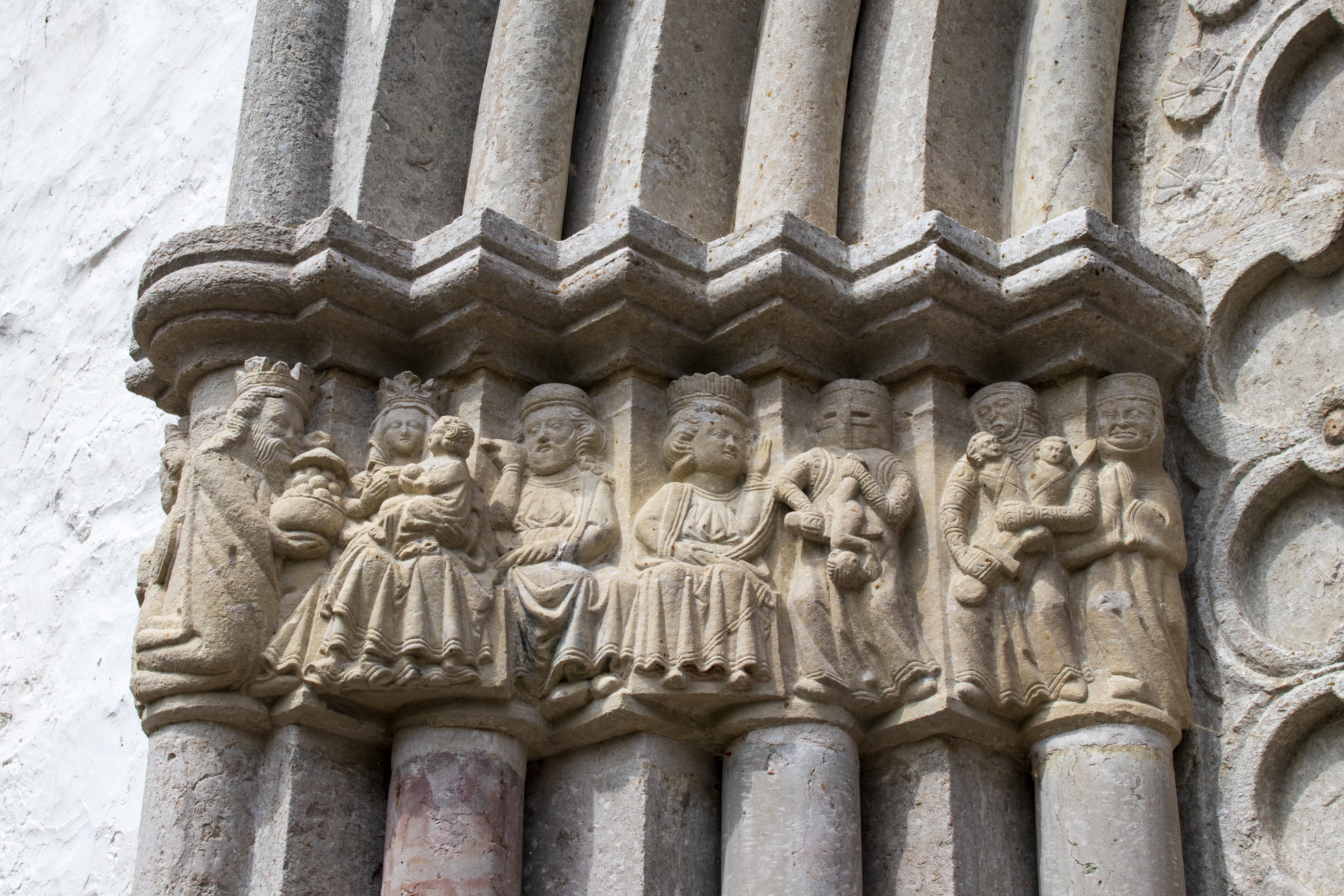 Capiteis do portal do coro da igrexa de Lye, na illa sueca de Gotland.